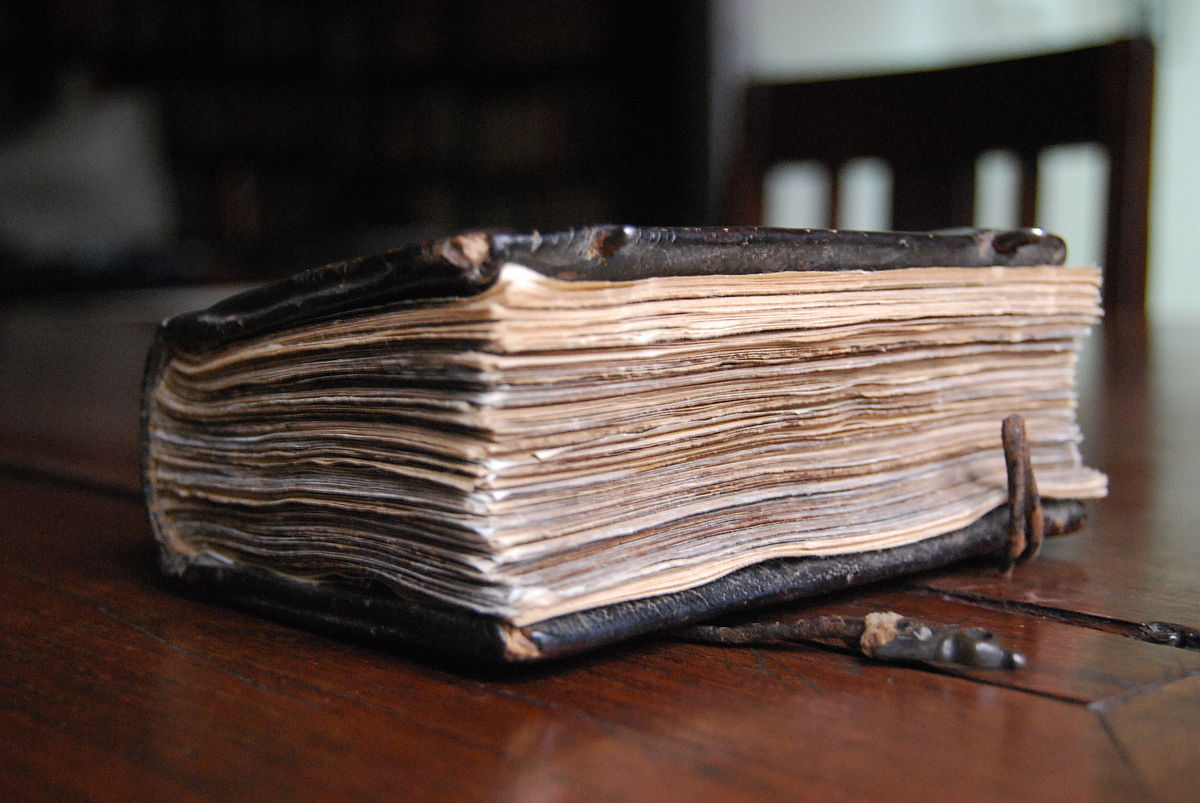 Српски (ћирилица): Примерак ретке књиге.